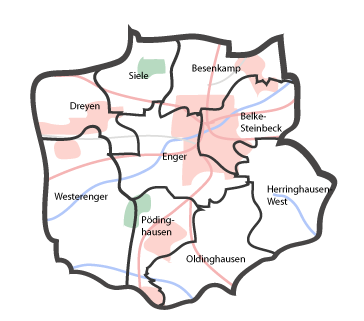 Maps of Kreis Herford (Germany) series. Shows various kinds of information including topographical, demographical, and use of land information for all communities of Kreis Herford and the district of Herford itstelf.